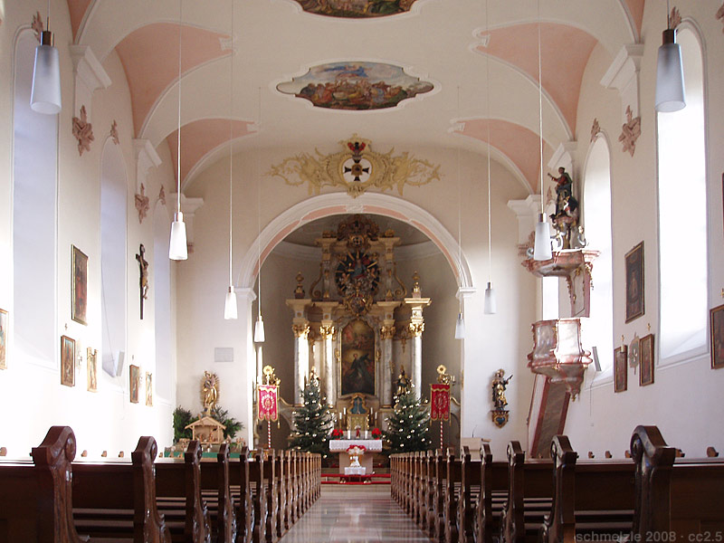 Innenraum der St.-Alban-Kirche in Offenau